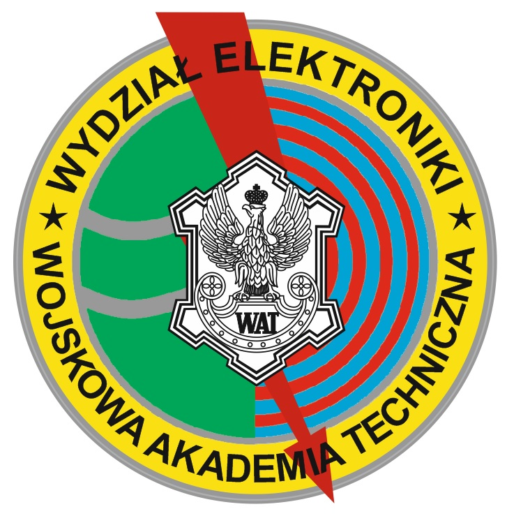 Logo WEL WAT